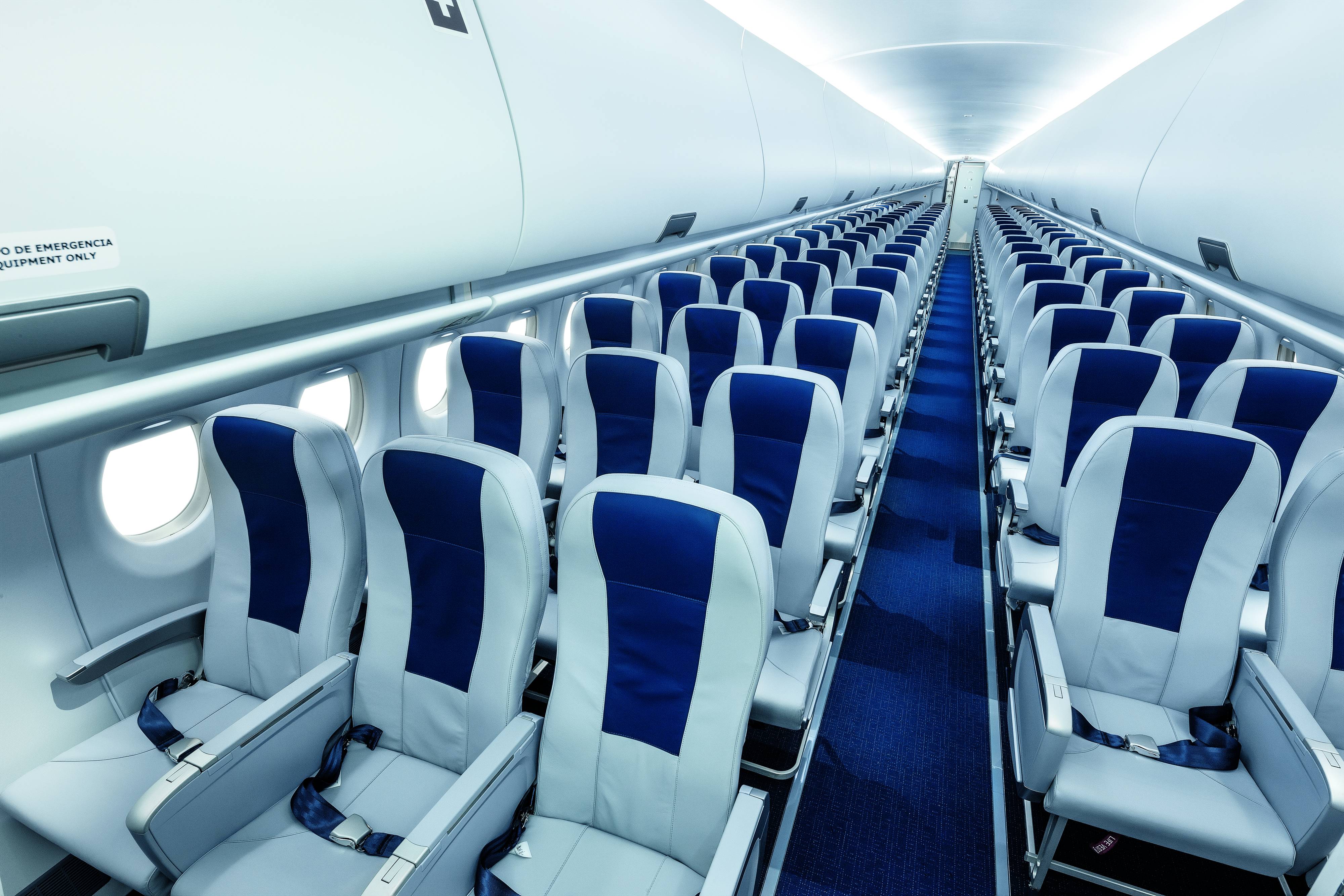 Passenger cabin of an Interjet Sukhoi Superjet